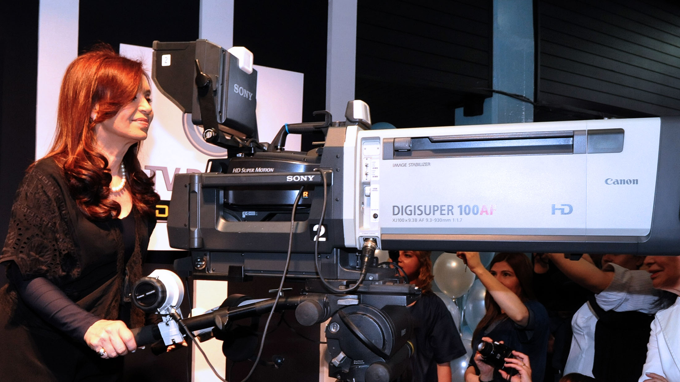 La presidenta Cristina Fernández participó de la celebración de los 60 años de la tevé, en la sede de la Televisión Pública. En el edificio de Canal 7, la jefa de Estado descubrió una placa por el 60º aniversario de la televisón, y recorrió el nuevo móvil de exteriores para alta definición.